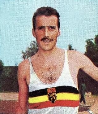 Gaston Roelants en 1964, champion olympique du 3 000m steeple à Tokyo, Panini Olympia 1896 - 1972', Panini figurina n°219.